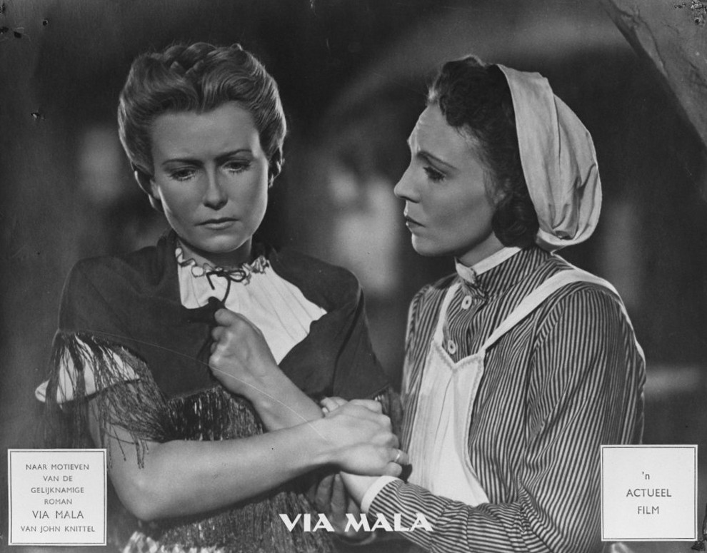 Actueel film repros Via Mala, Karin Hardt en Hilde Körber